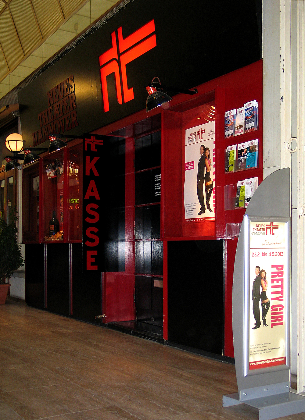 Zugang zum Neuen Theater im Haus Basse, Georgstraße 54, erhalten die Besucher über die Kasse ...